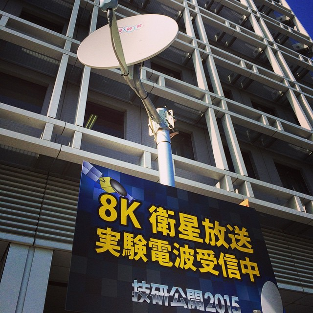 4K 8Kテレビ放送のテスト受信実験